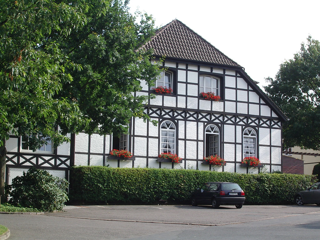 Der Bösehof in Bederkesa, Wohnsitz des Bremer Kaufmanns Heinrich Böse, genannt "Hauptmann" Böse, eines Anführers in den Befreiungskriegen gegen Napoleon.